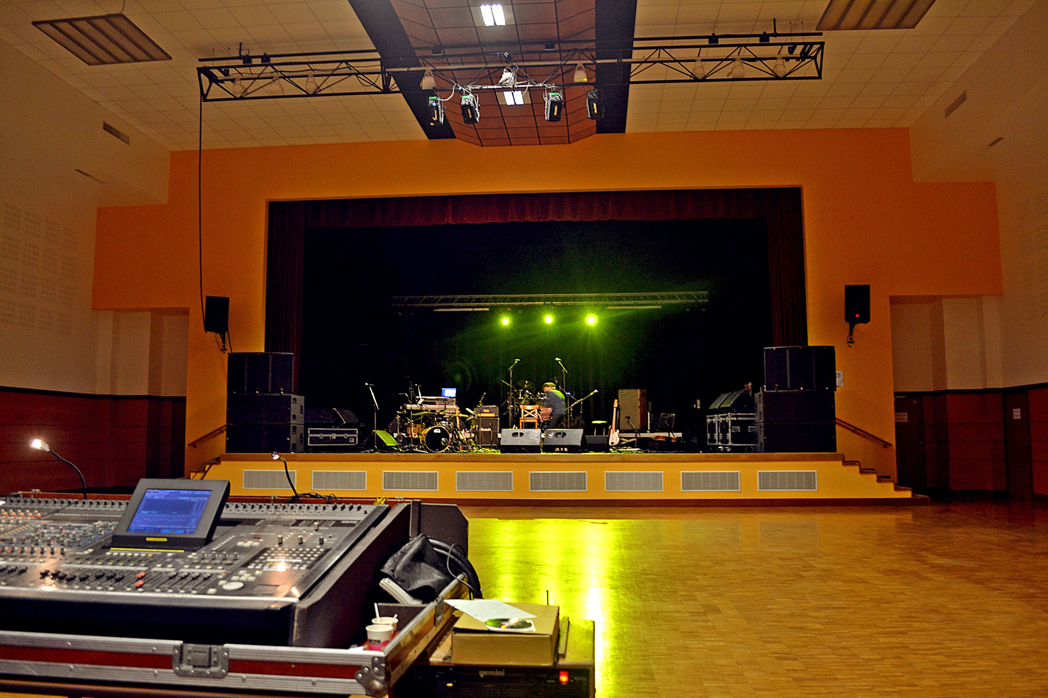 Grande salle de Tronjoly à Gourin.